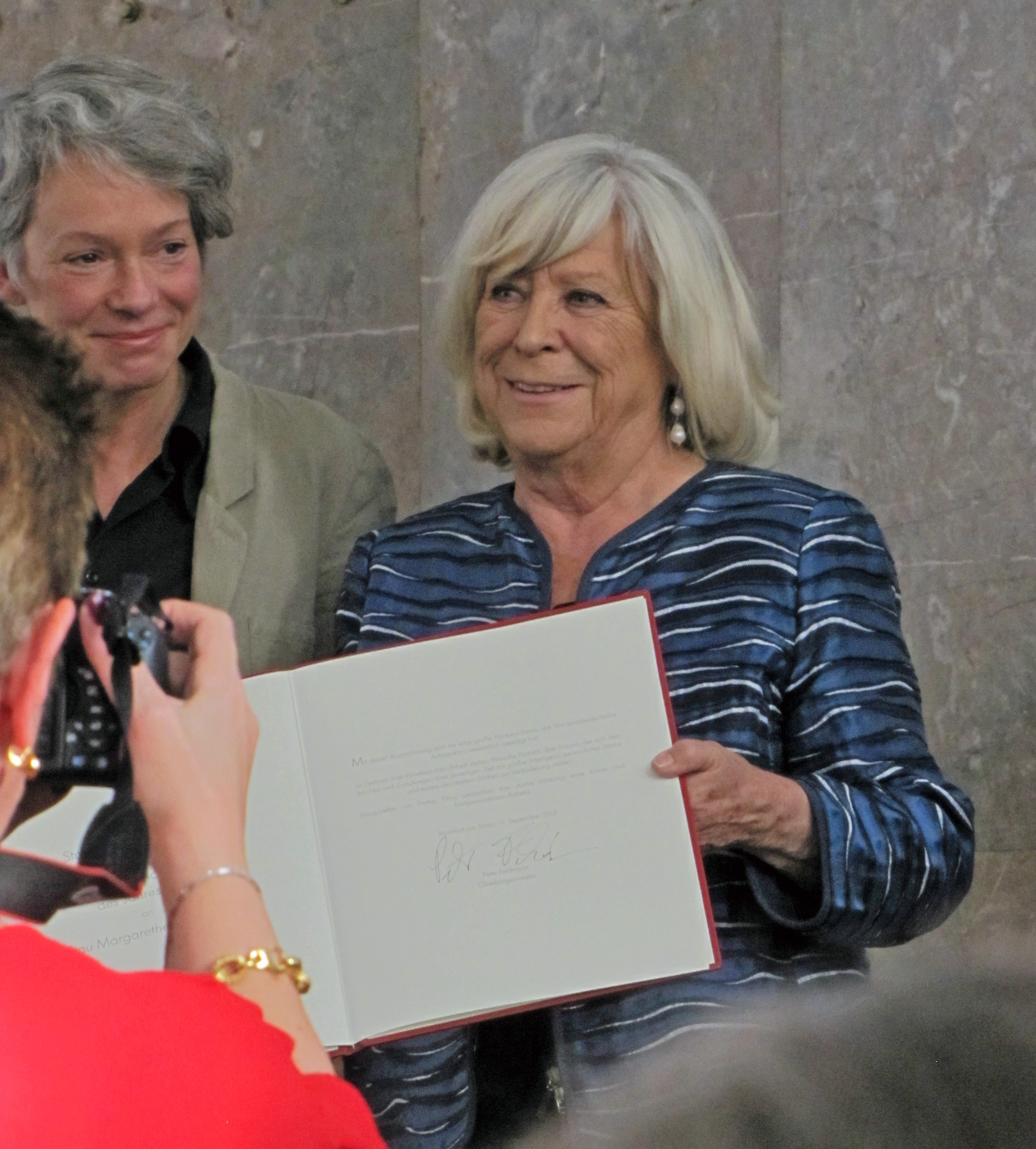 Margarethe von Trotta zeigt den Pressefotografen die Preisurkunde, in der Frankfurter Paulskirche zur "Überreichung des Theodor-W.-Adorno-Preises 2018 an Margarethe von Trotta.